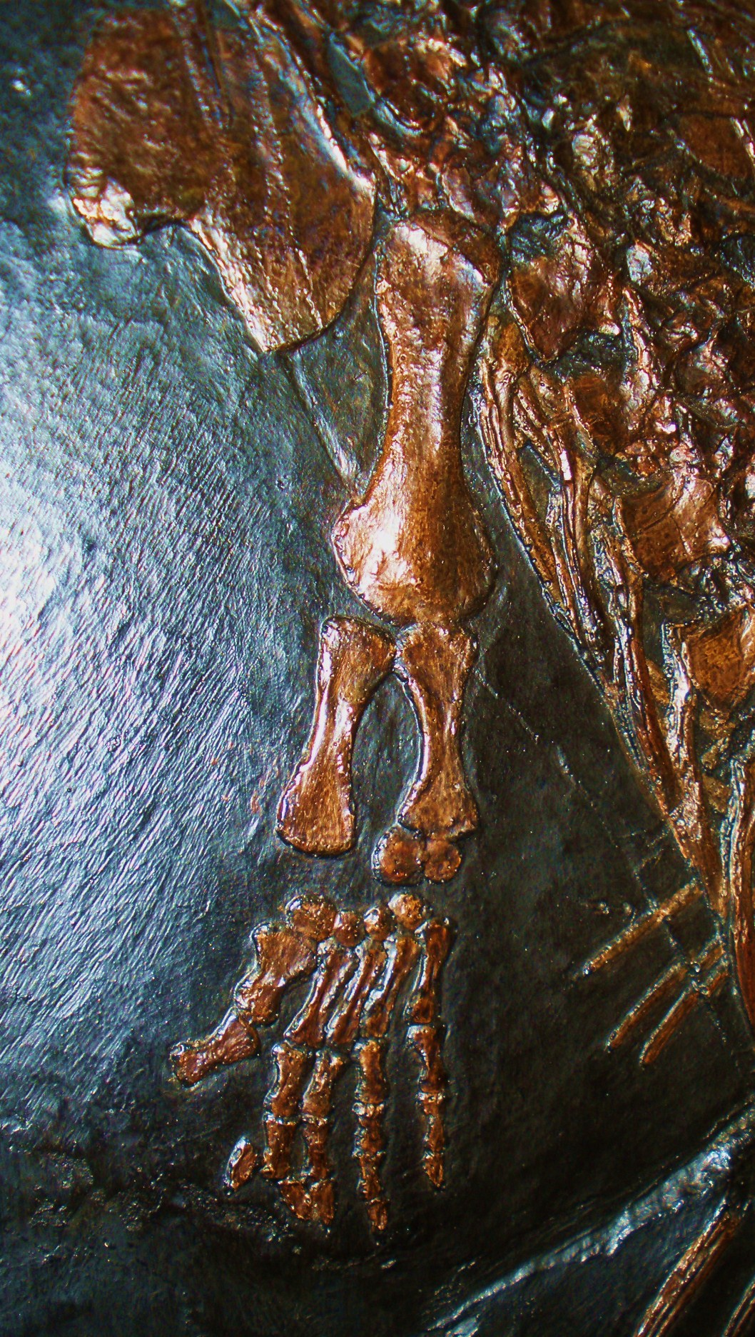 Fossil of Askeptosaurus, an extinct reptile-- Took the photo at Museo dei Fossili di Besano